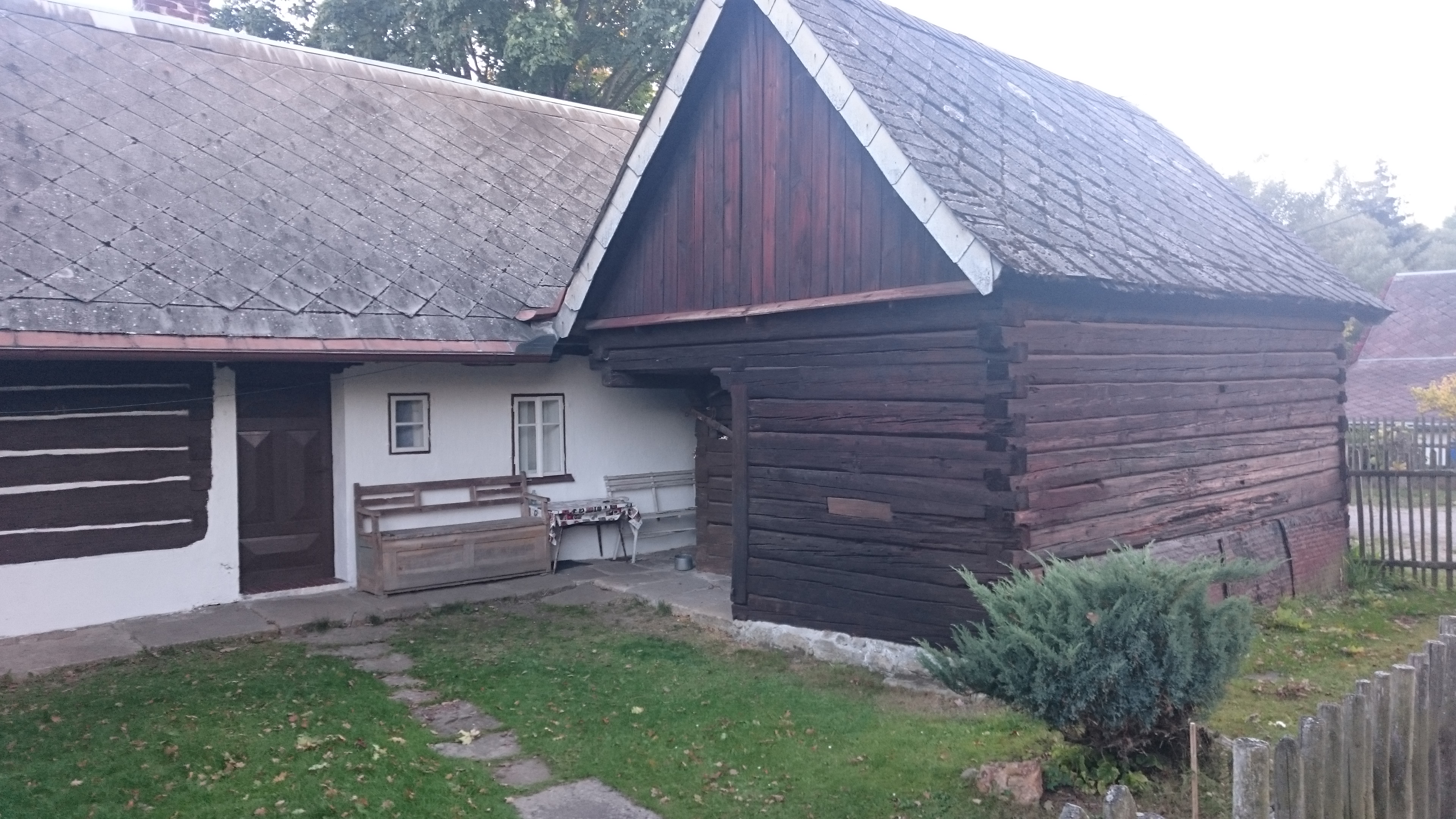 Roubenka ve Skelné Huti. Okres Plzeň-sever, Česká republika.